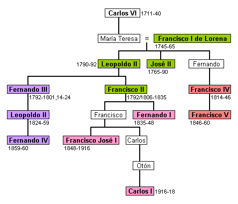 Árbol genealógico de la casa de Habsburgo-Lorena: incluye emperadores germánicos, reyes de Hungría y Bohemia, grandes duques de Toscana, duques de Módena y emperadores de Austria.